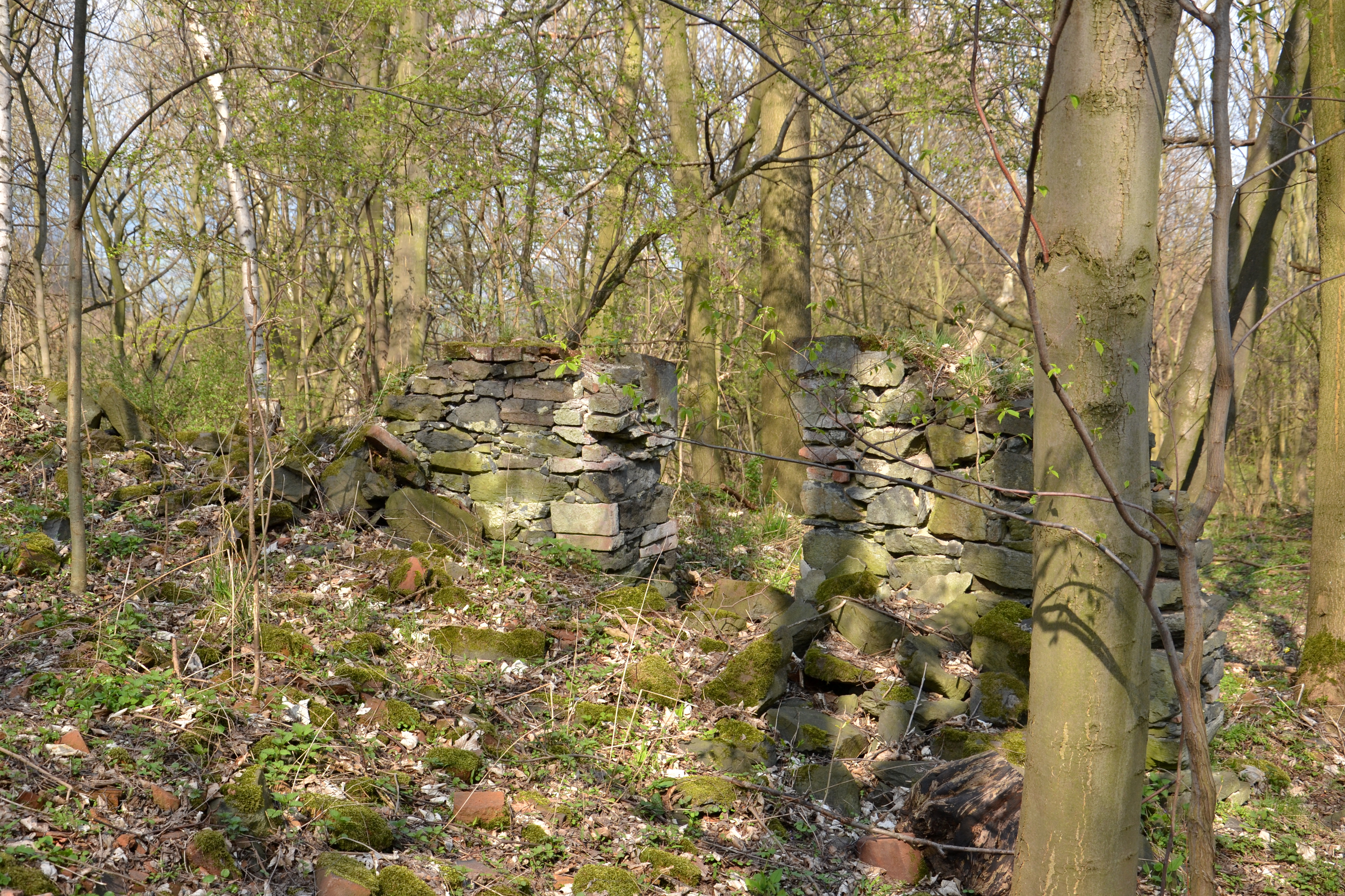 Zaniklá vesnice Úhošť